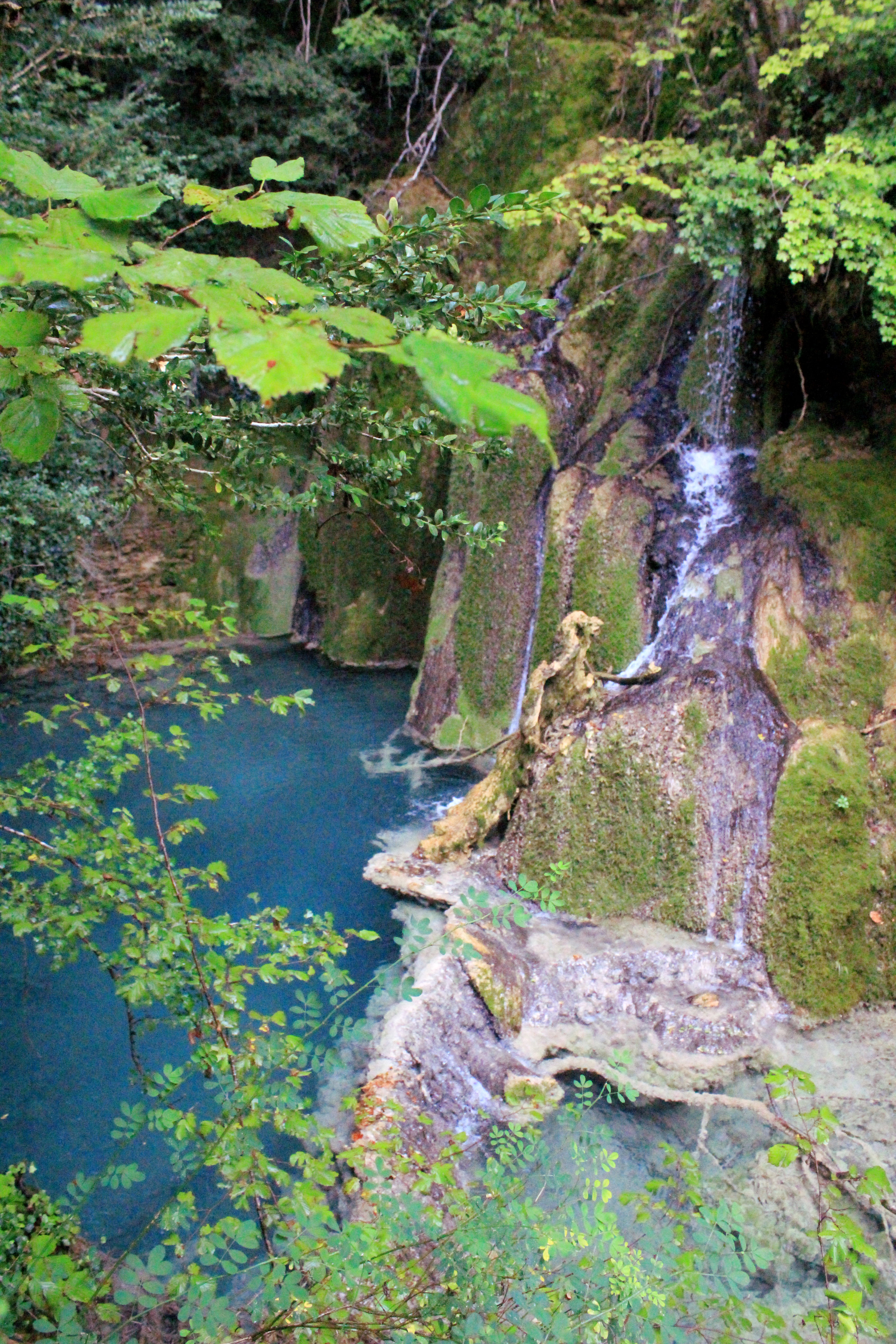 Aragonés: Basas d'o río Forcos debaixo d'o molino d'Escartín